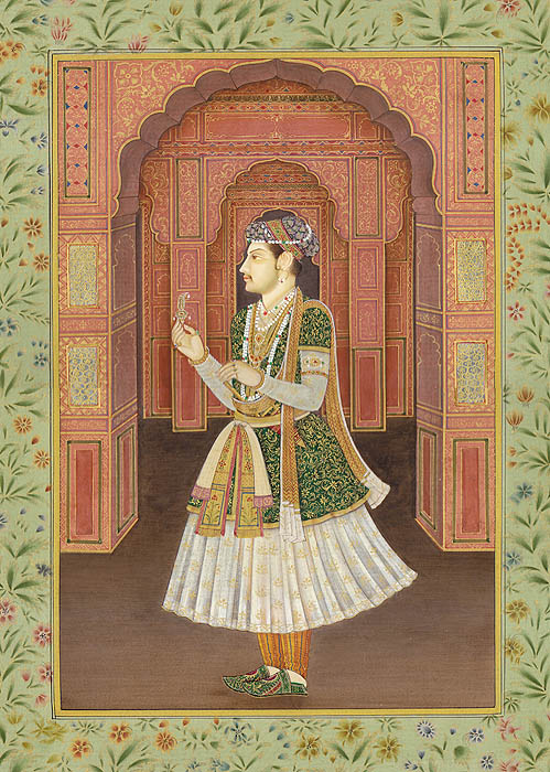 Shah Shuja of Mughal